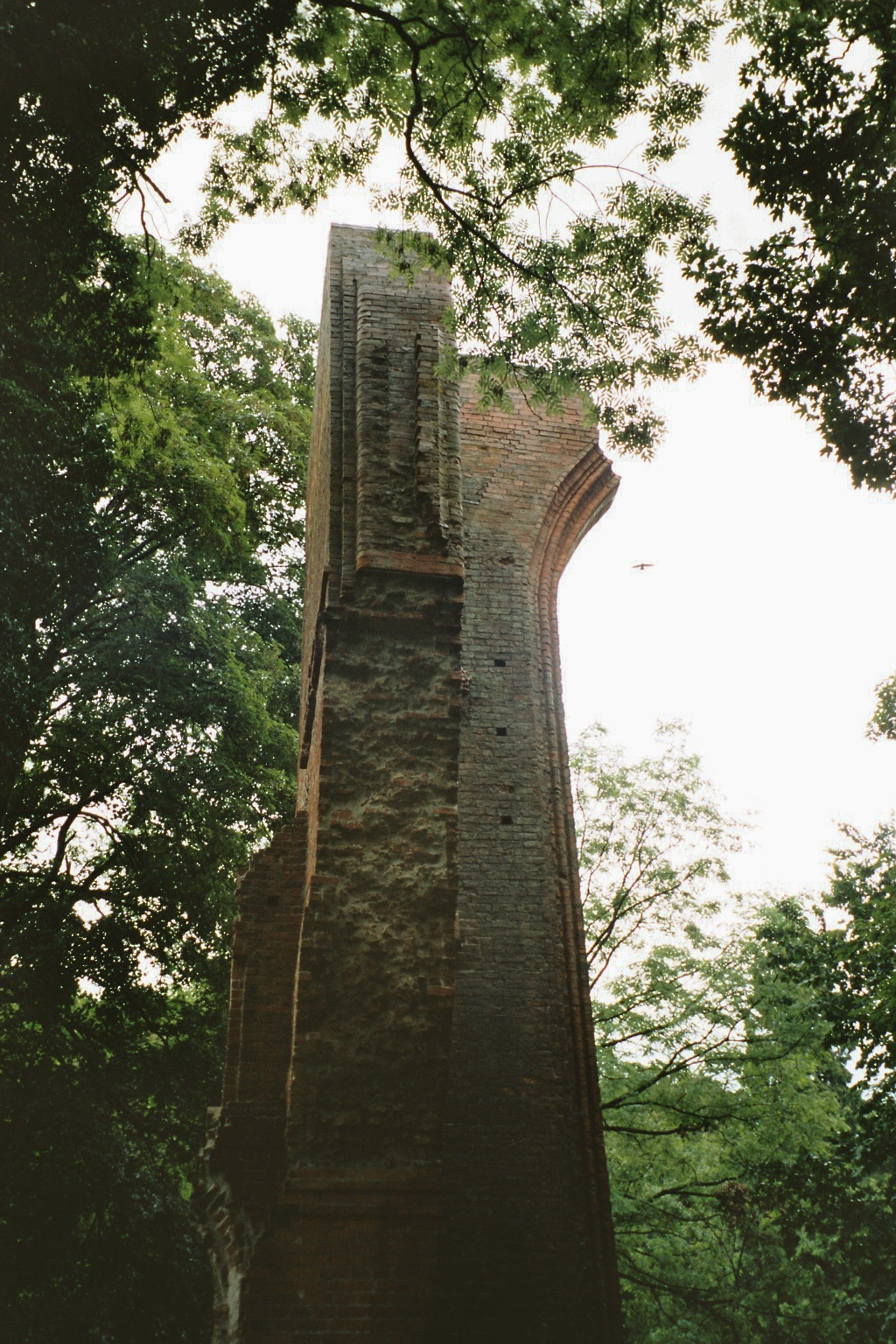 Ruine des Klosters Hude